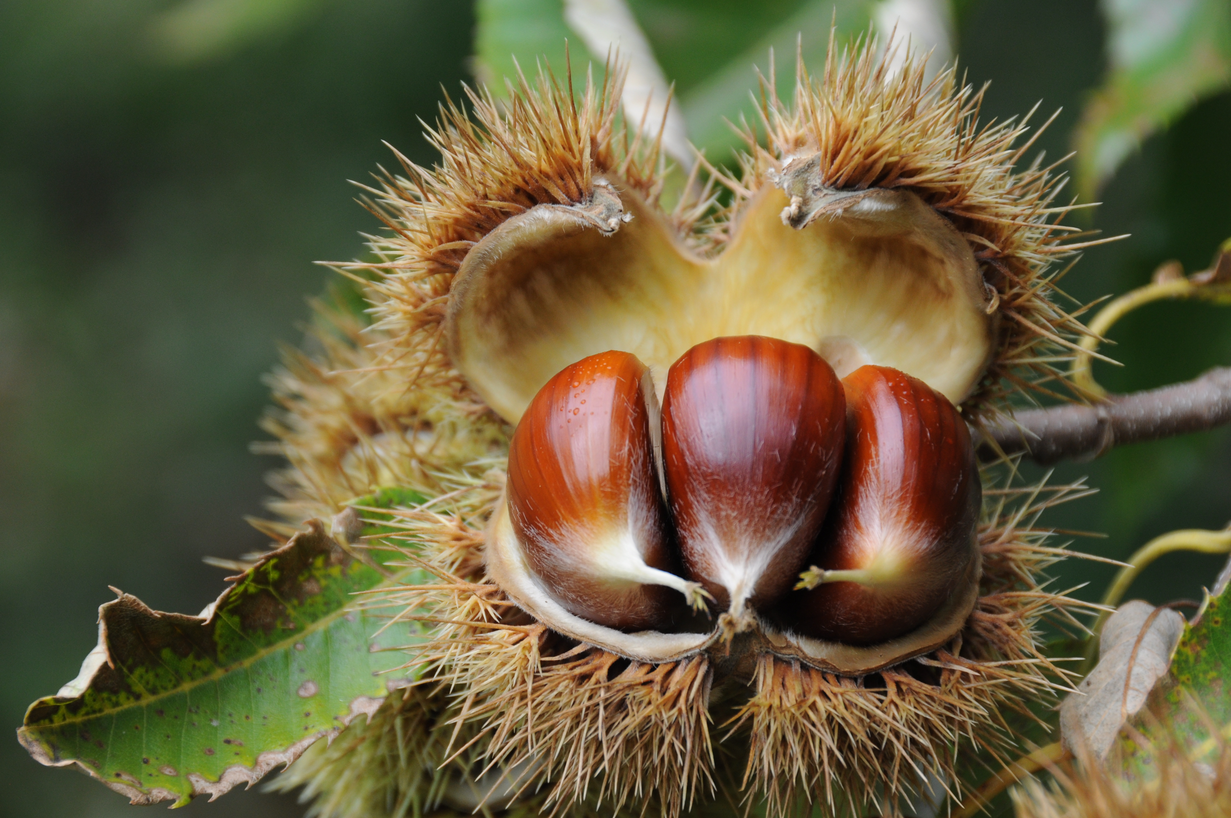 Châtaignes dans leur bogue (récolte 2015)